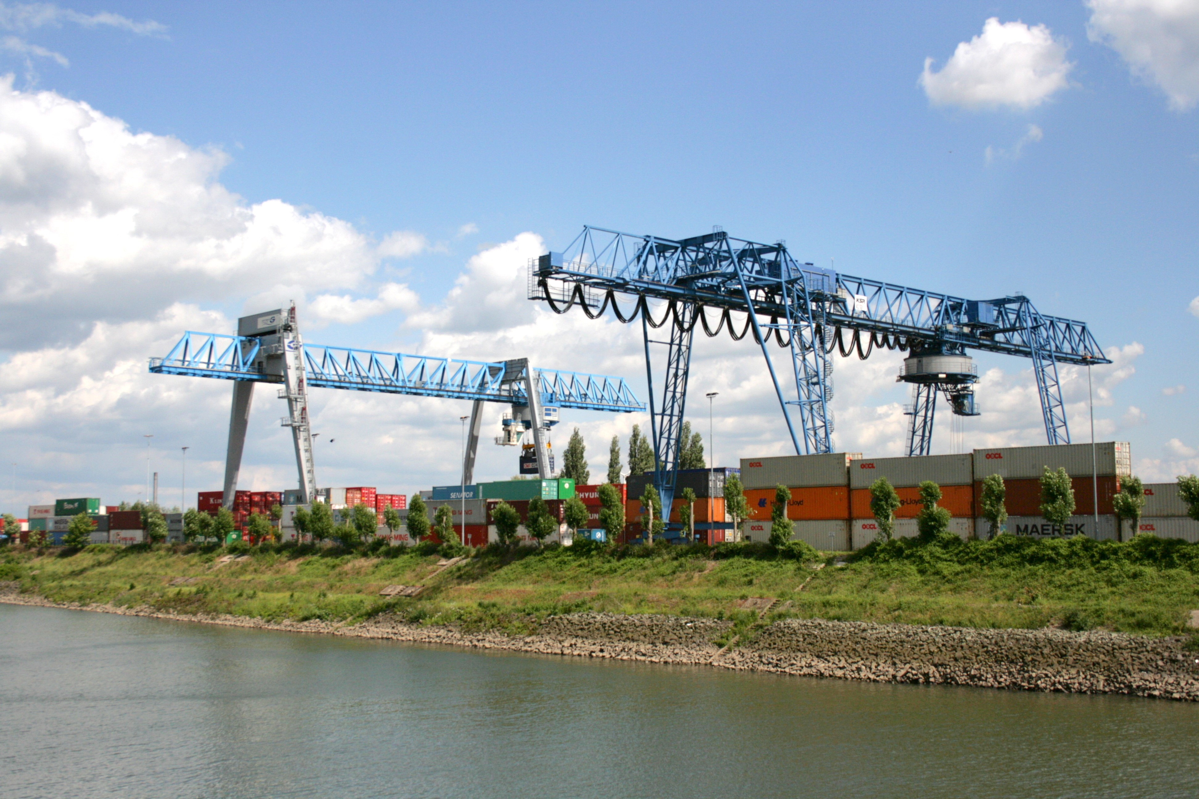 Rheinhafen in Emmerich am Rhein